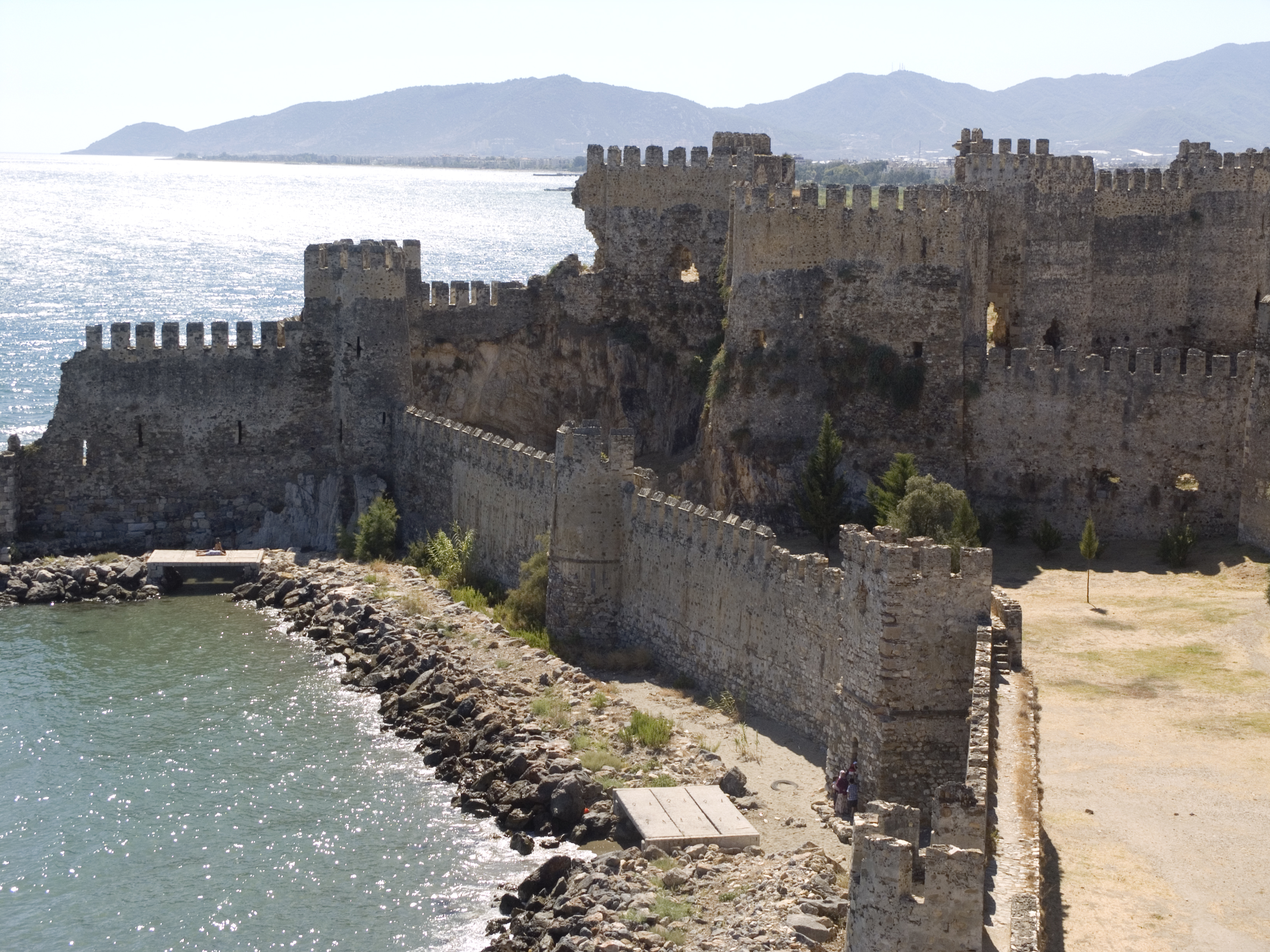 Турция, Анамур – Крепость Мамуре